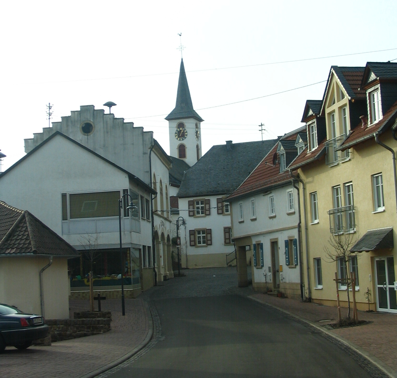 Ortsmitte Bockenau